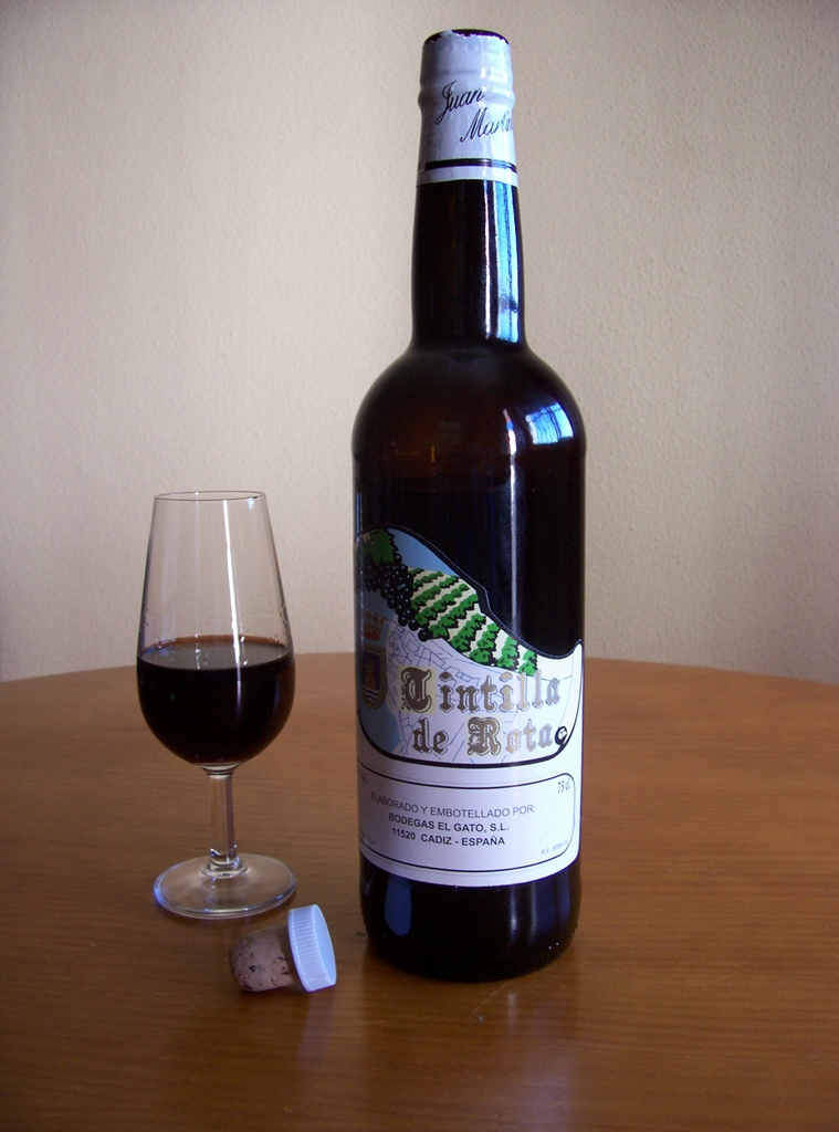 Botella y catavino de Tintilla de Rota-Cádiz-Andalucía-España